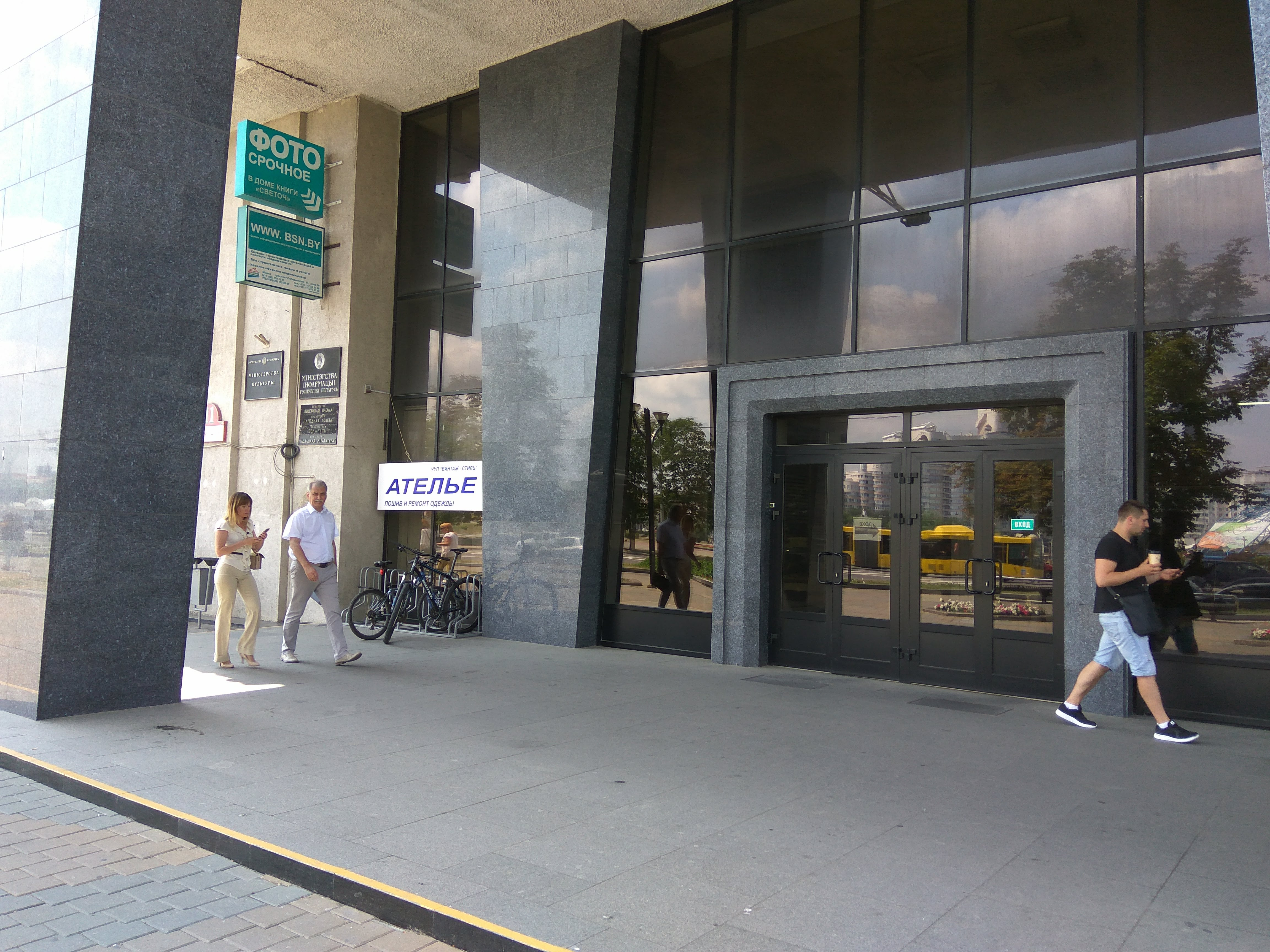 Мінск. Міністэрствы інфармацыі і культуры Беларусі